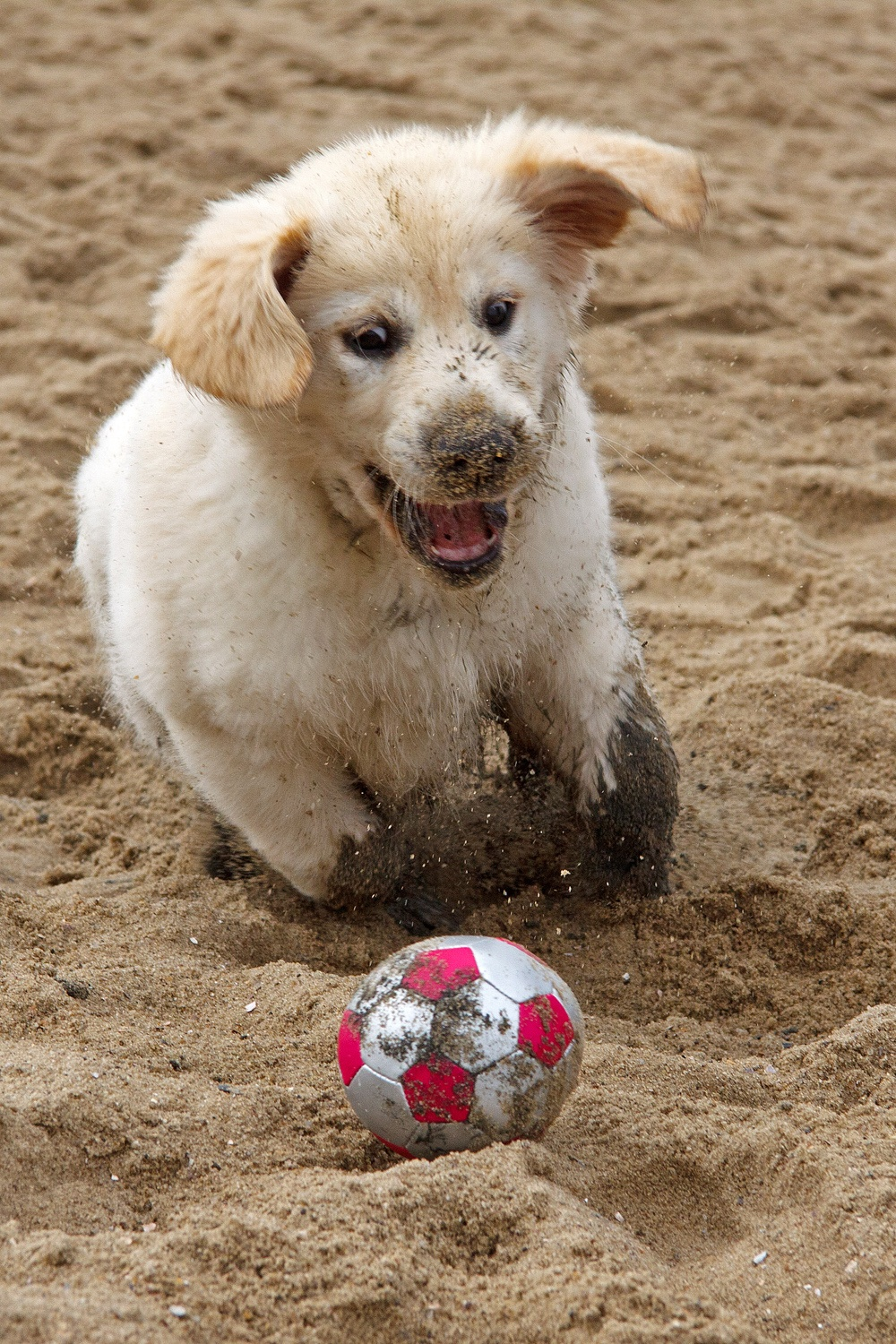 Dangast, Jadebusen, Niedersachsen, Deutschland, Datum/Uhrzeit: 04.09.2011 12:00:55